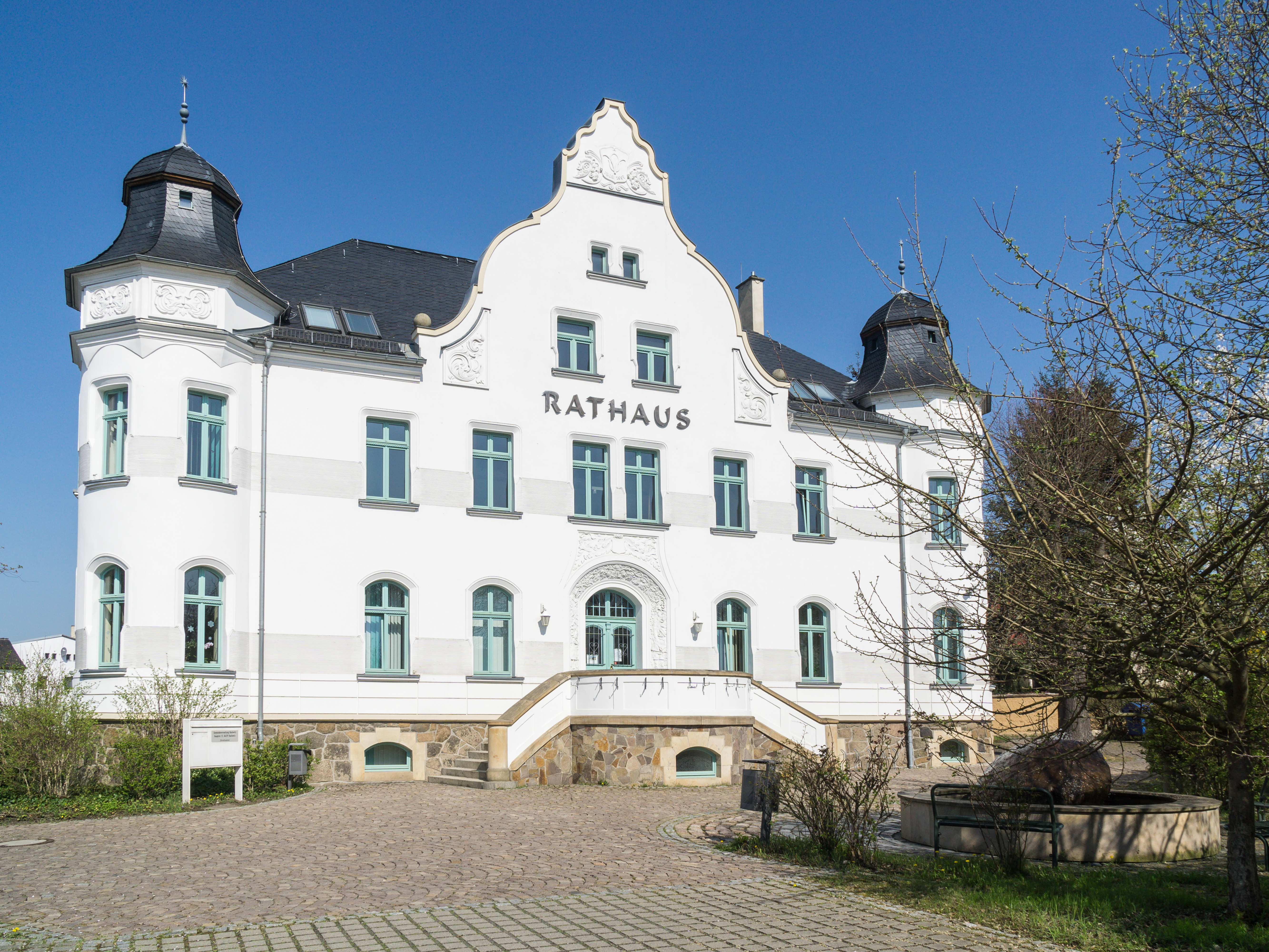 Rathaus, Hauptstraße 11 in Rackwitz